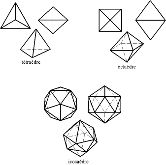 Polyèdres réguliers à faces triangulaires. Auteur : Christophe Dang Ngoc Chan, réalisé avec un logiciel de dessin vectoriel. Licence GFDL Christophe Dang Ngoc Chan